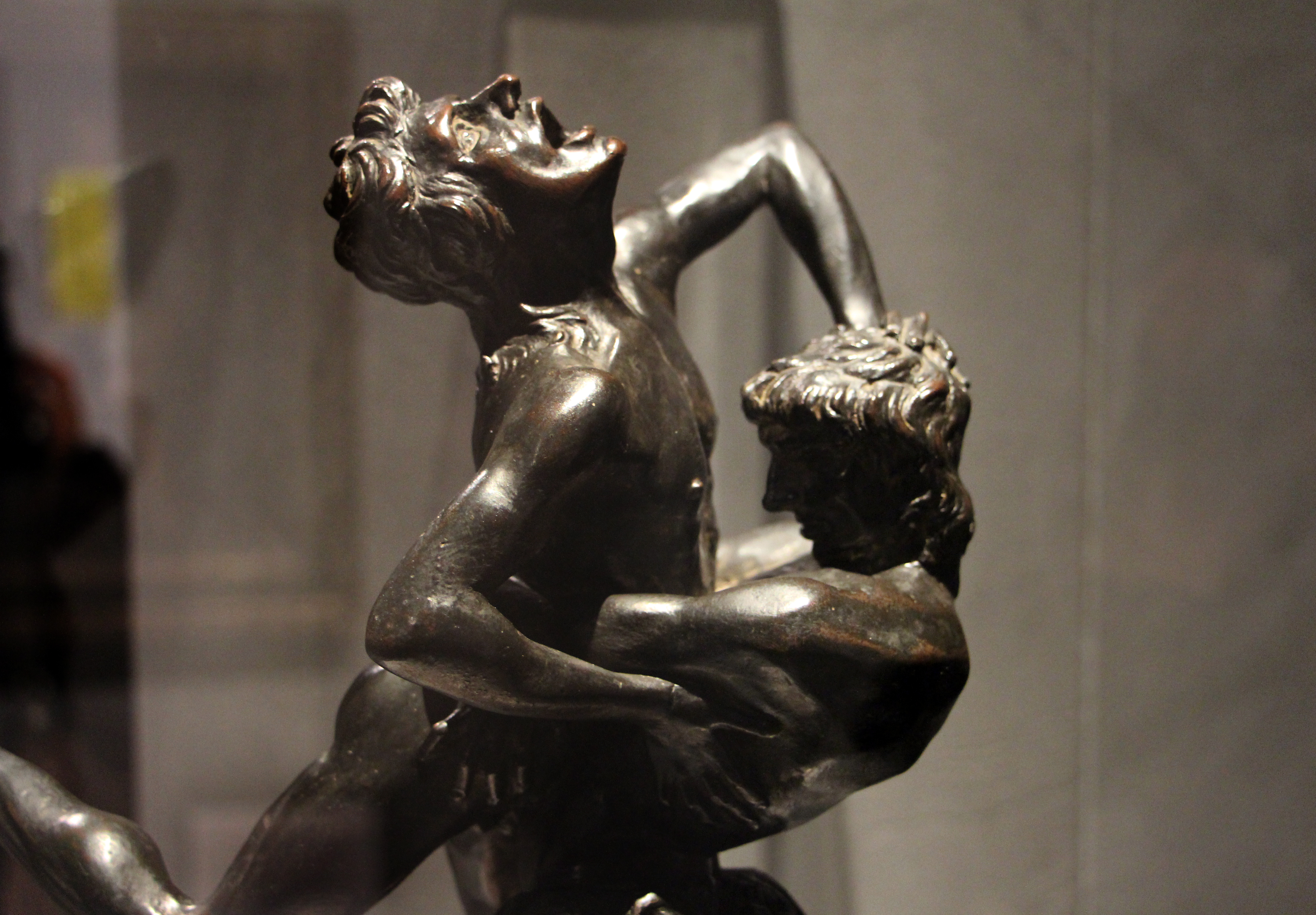 Antiono e Piero del Pollaio